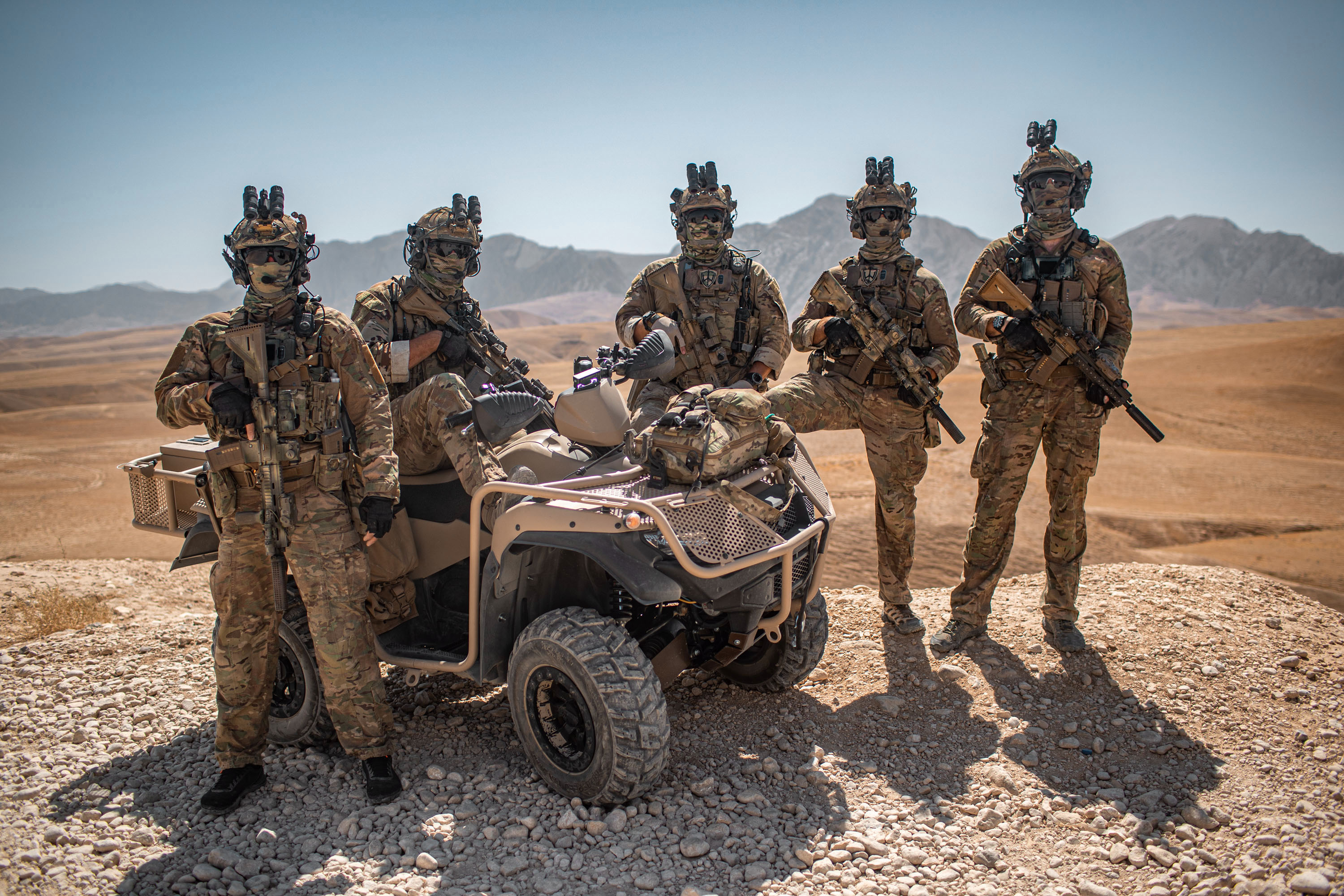 Ontspannen koppen en veel grappen, maar in een oefening of operatie gaat de knop direct om. Het laat de professionaliteit zien van de veelzijdige Maritime Special Operations Forces (MARSOF)-operators. De mannen van de Afghan Territorial Force 888 mogen blij zijn met deze toptrainers. Andersom leren de Nederlandse special forces ook van de Afghanen. De maritieme special forces maken deel uit van het Special Operations Advisory Team (SOAT) dat de Afghanen binnen NAVO-missie Resolute Support de kneepjes van het SF-vak bijbrengt. ATF 888, actief in het noorden van Afghanistan, is een van de triple units, de speciale politie-eenheden van de Afghaanse overheid. Het Korps Commandotroepen (KCT) zette vorig jaar het trainingsprogramma op vanuit Camp Marmal bij Mazar-e-Sharif. De vierde rotatie is voor MARSOF. Het doel? Over 2 jaar moeten de Afghanen zelfstandig, met een helikopter of auto ergens heen verplaatsen. Maar ook hun eigen veiligheid waarborgen, een instap maken en iemand oppakken, die betrokken is bij terreur, drugshandel of zware criminaliteit.